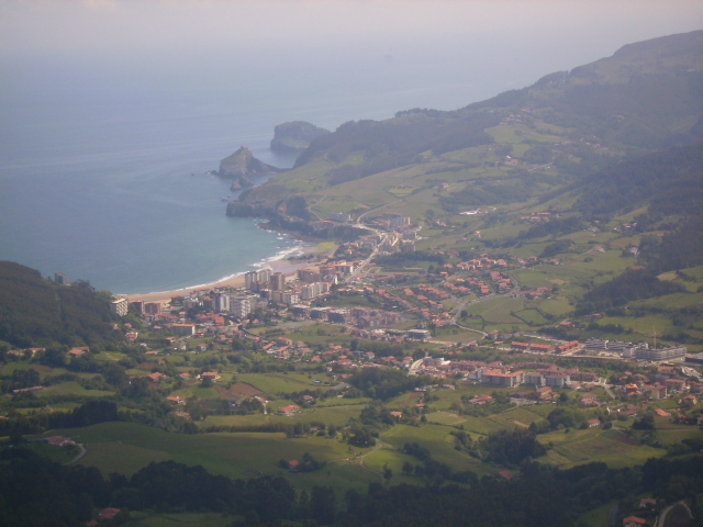 Bakio jata menditik